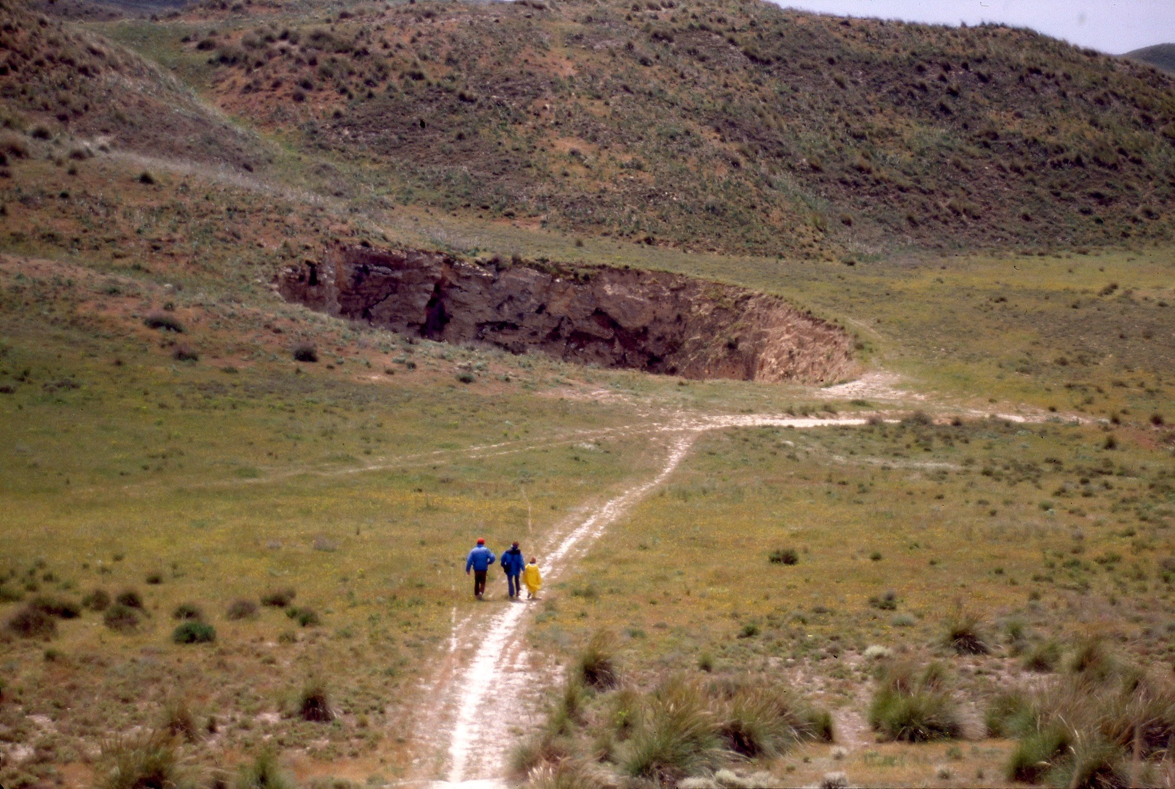 Dolina de colapso en yesos karstificados; 35 m de diámetro y 25 m de profundidad. Chinchón, Madrid, España. c.1991.